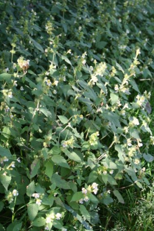 Galeopsis tetrahit